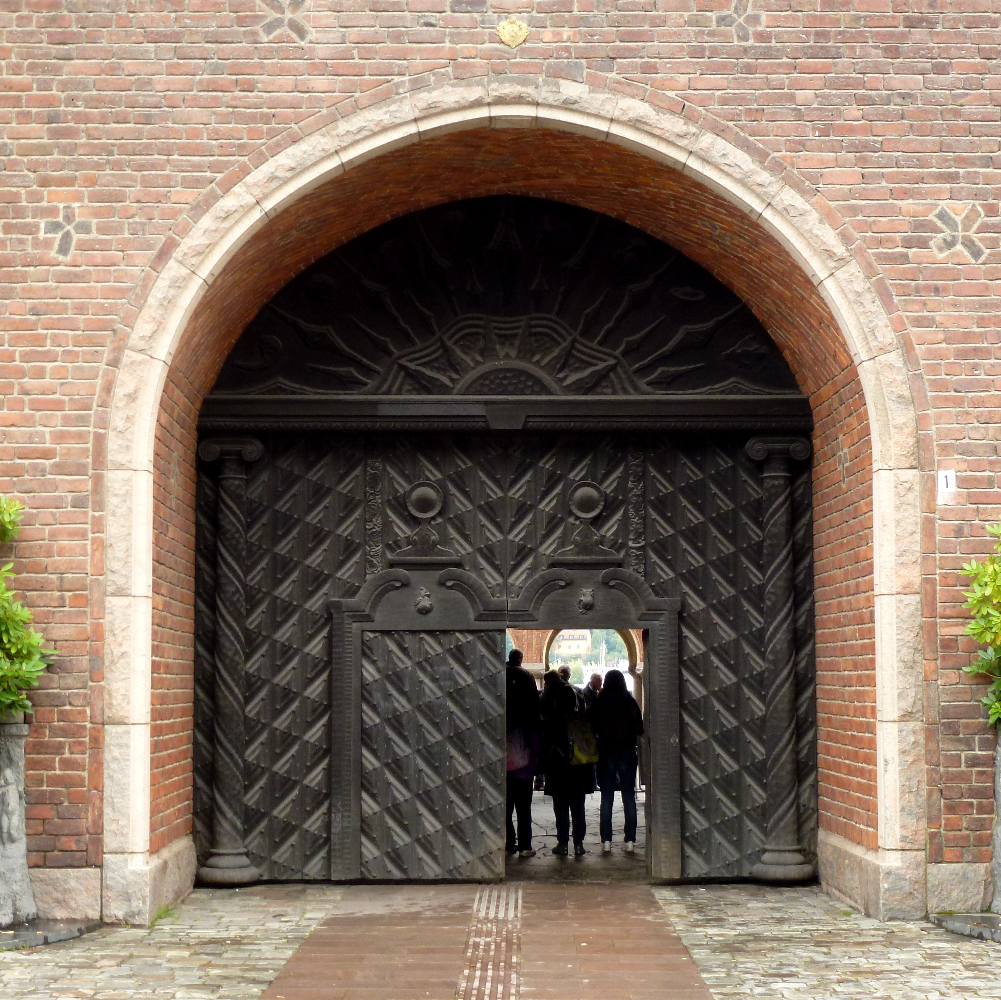 Huvudportal, norra fasad